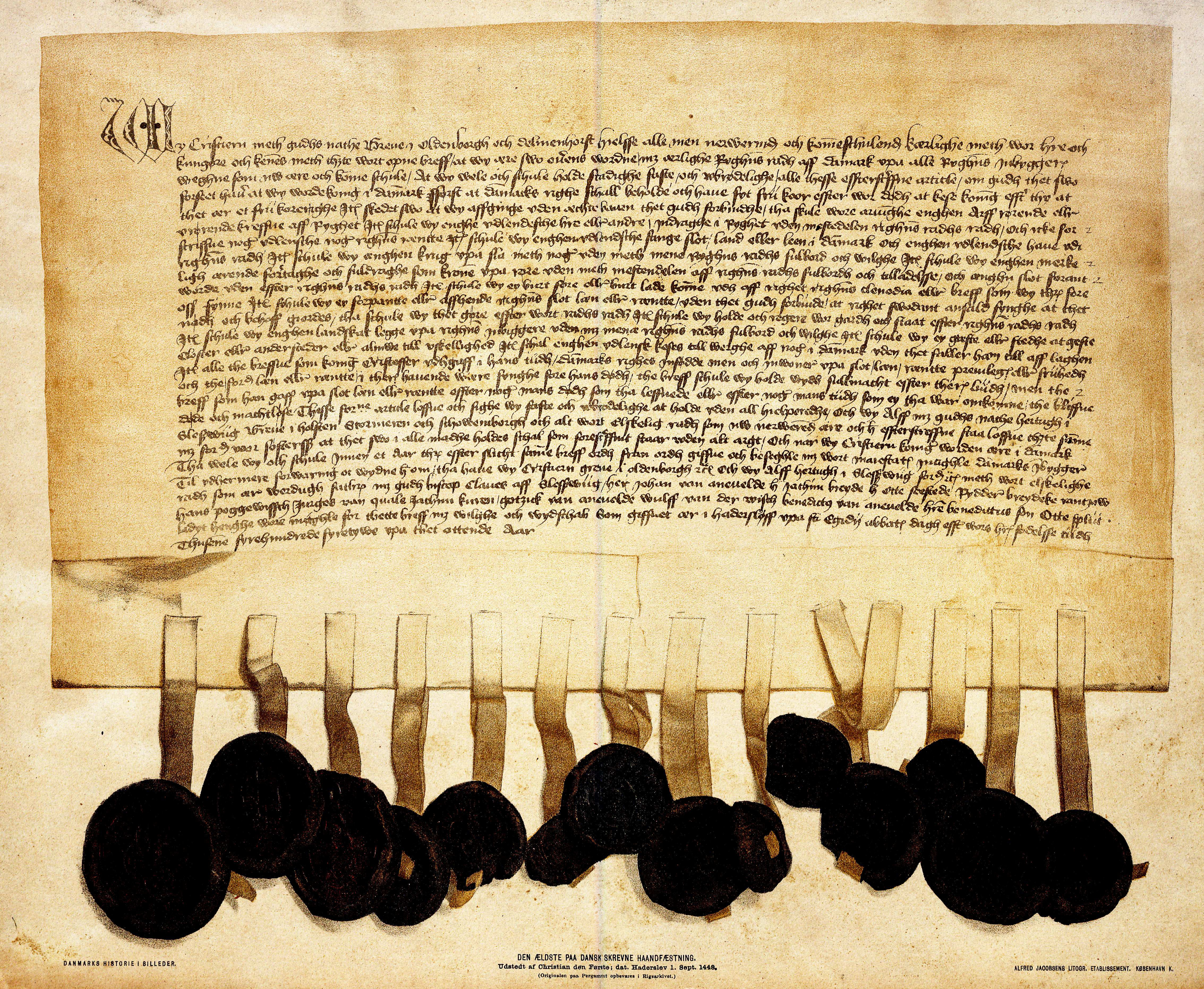 Christian den Førstes håndfæstning, Dateret 1448.